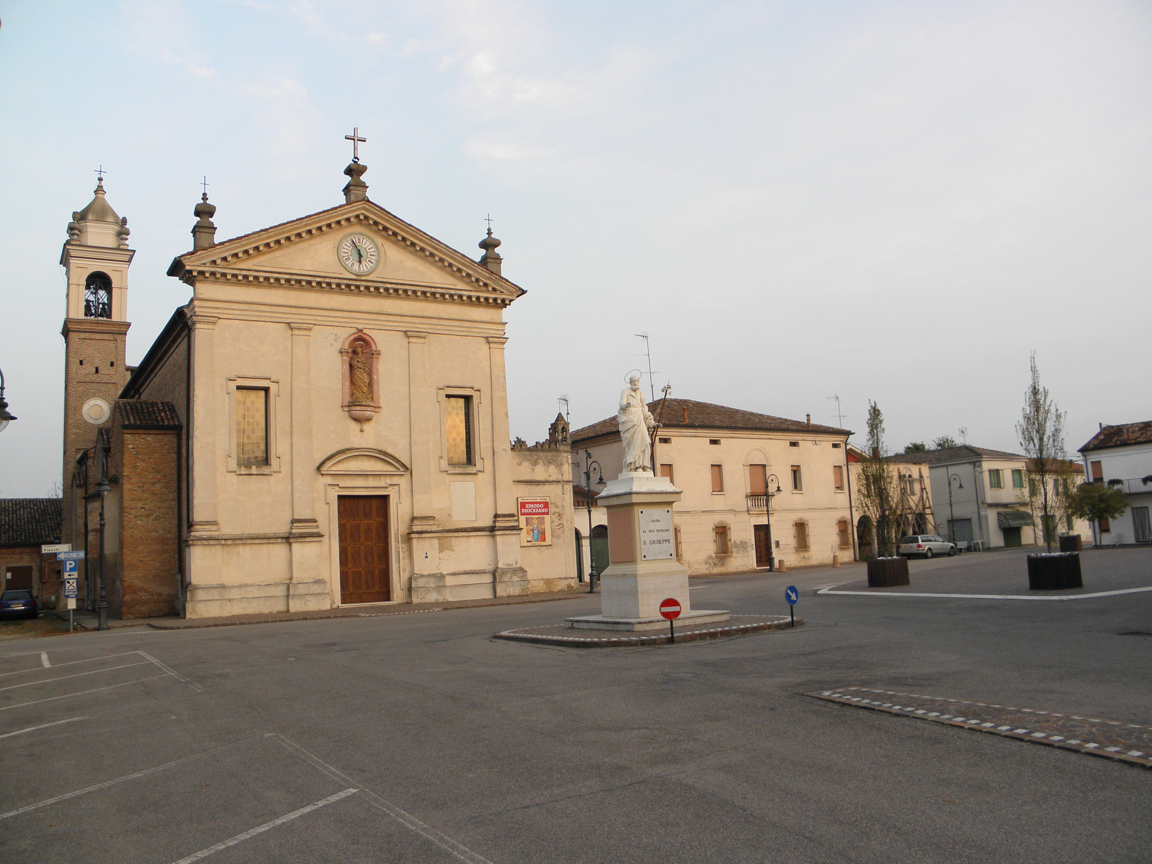 Gaiba: la centrale Piazza San Giuseppe con il monumento e la chiesa parrocchiale di San Giuseppe.